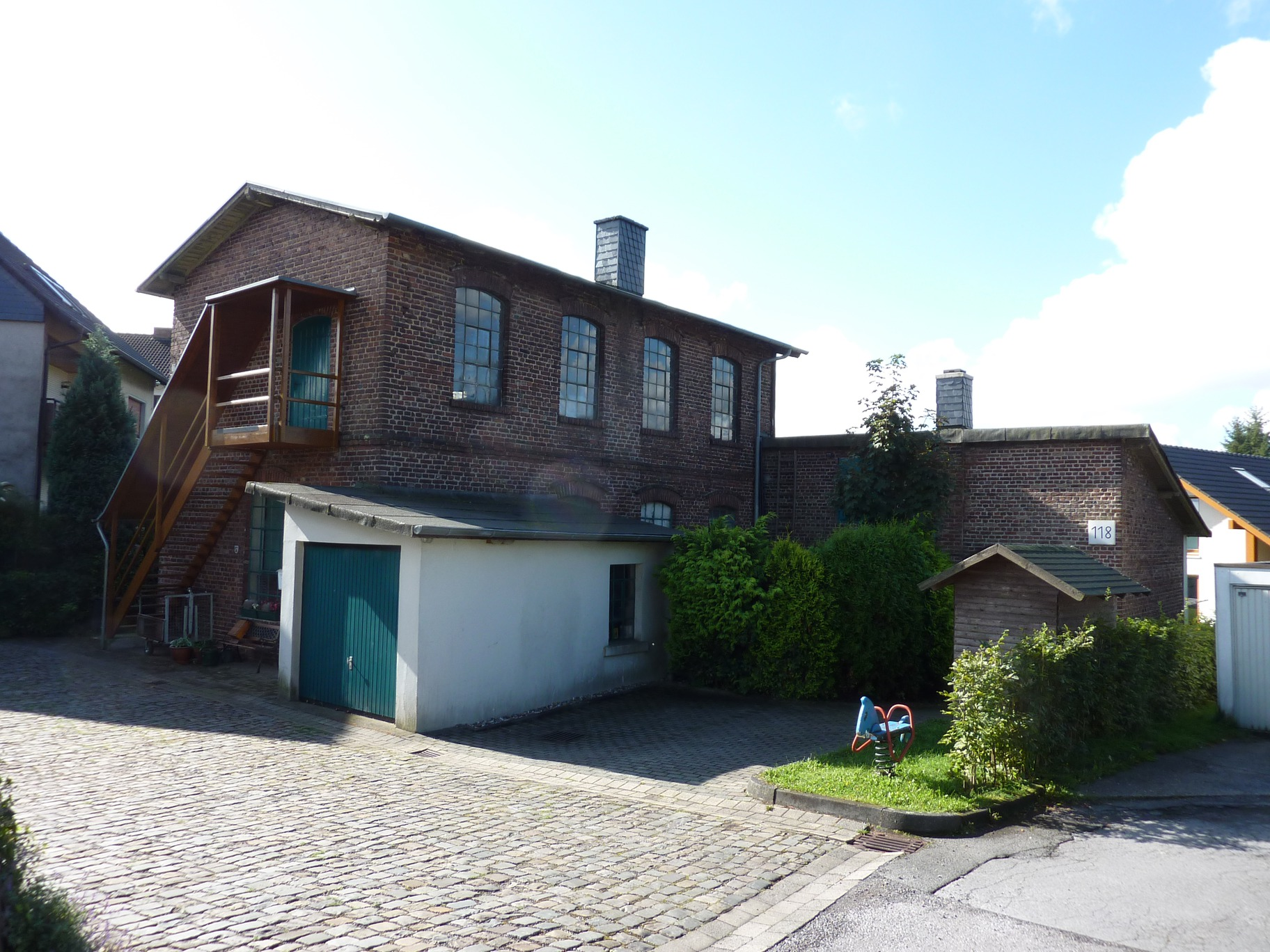 Bandwirkerei in Ennepetal-HillringhausenThis is a photograph of an architectural monument., no. 0